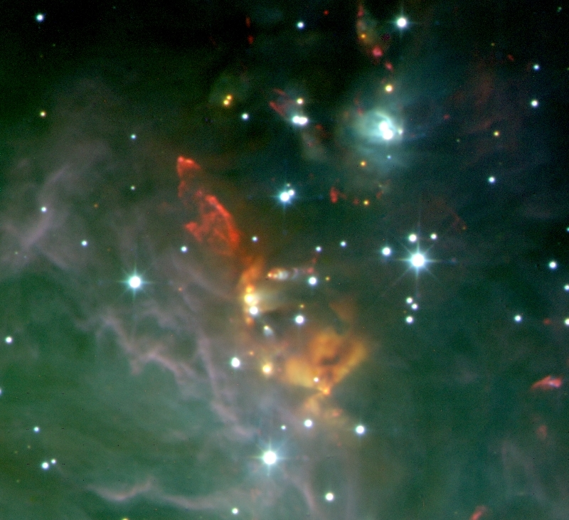 Obiekt Herbiga-Haro